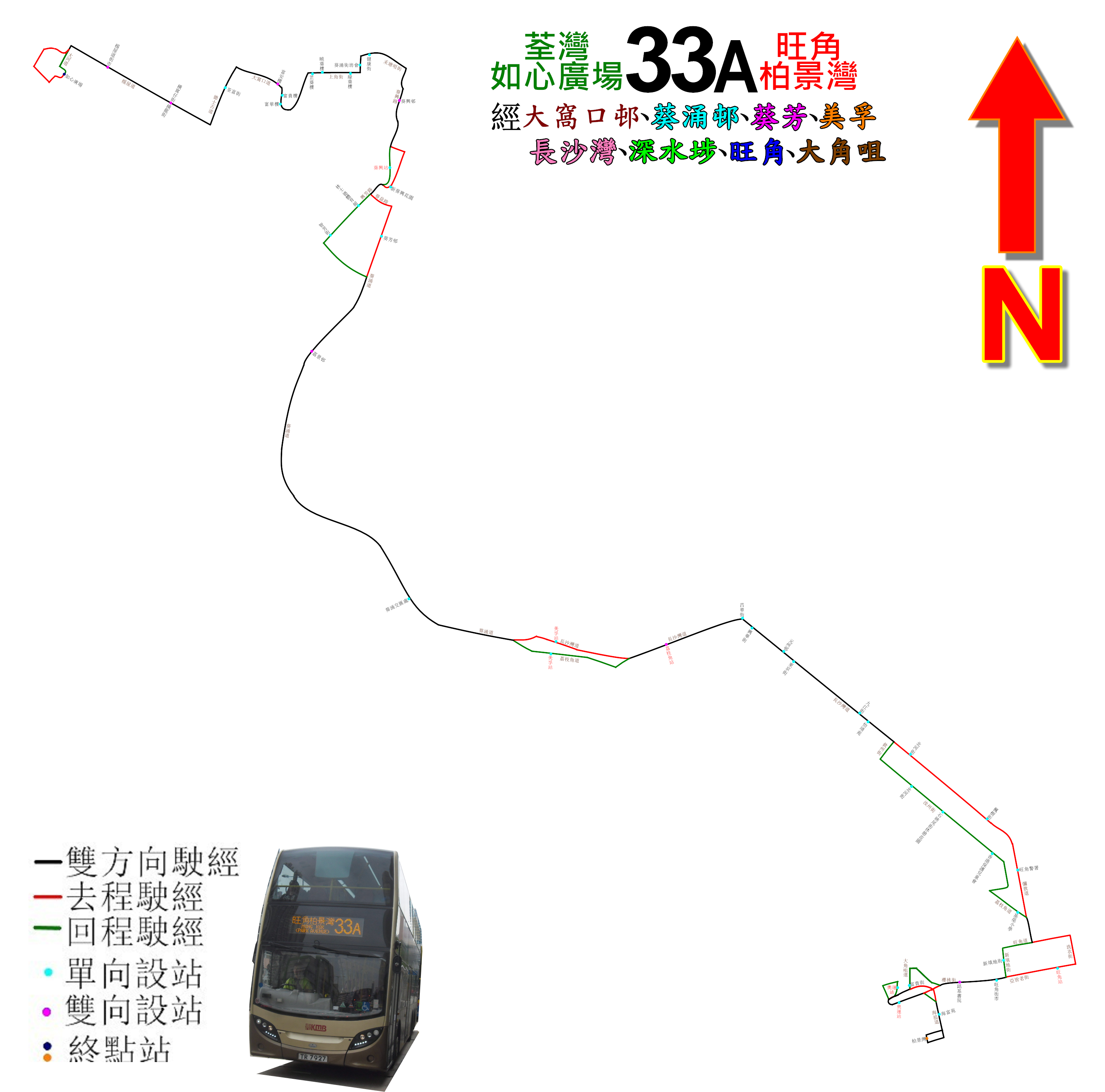 中文（香港）: 九巴33A線的走線圖